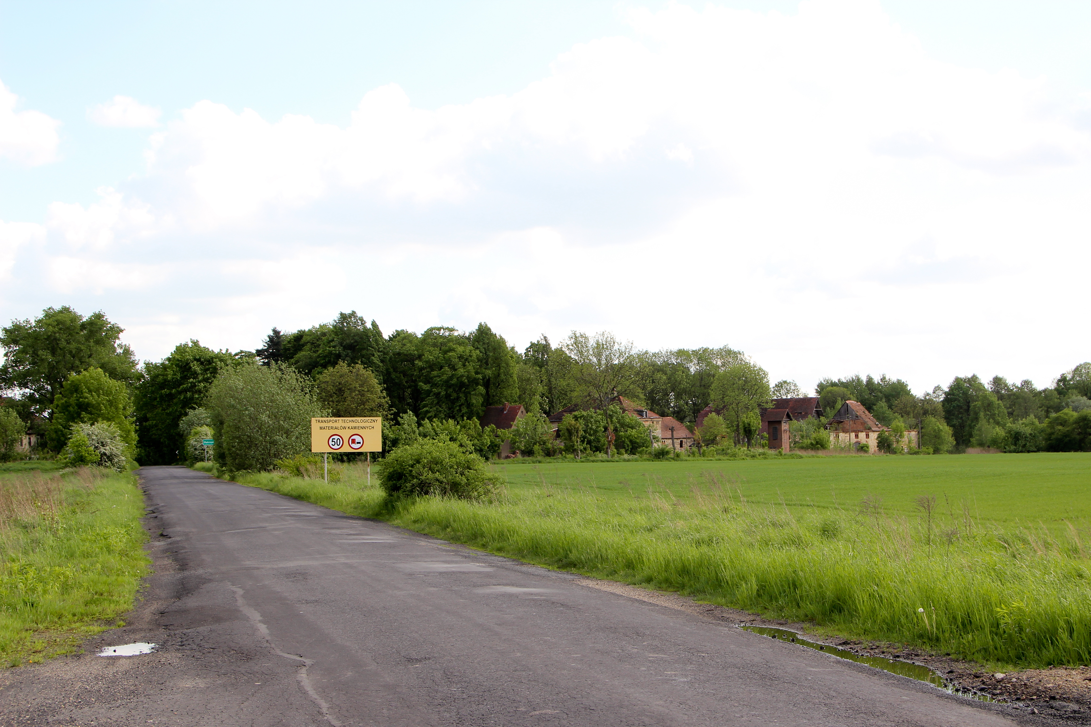 Pokrzywnik – wieś w Polsce, w województwie dolnośląskim, w powiecie zgorzeleckim, w gminie Zgorzelec.